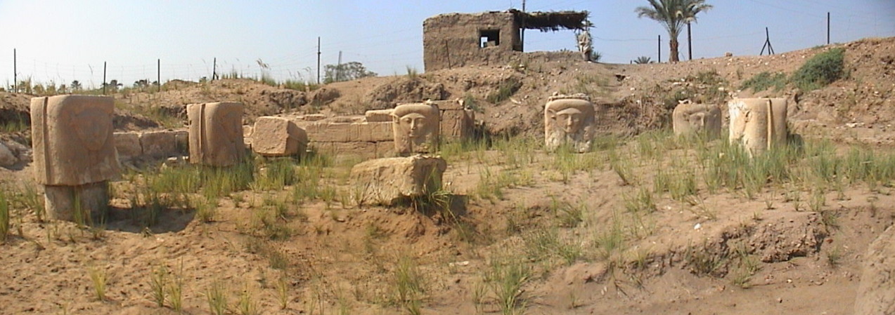 Vue d'ensemble de la cour péristyle aux chapiteaux hathoriques du temple d'Hathor de Memphis - août 2004